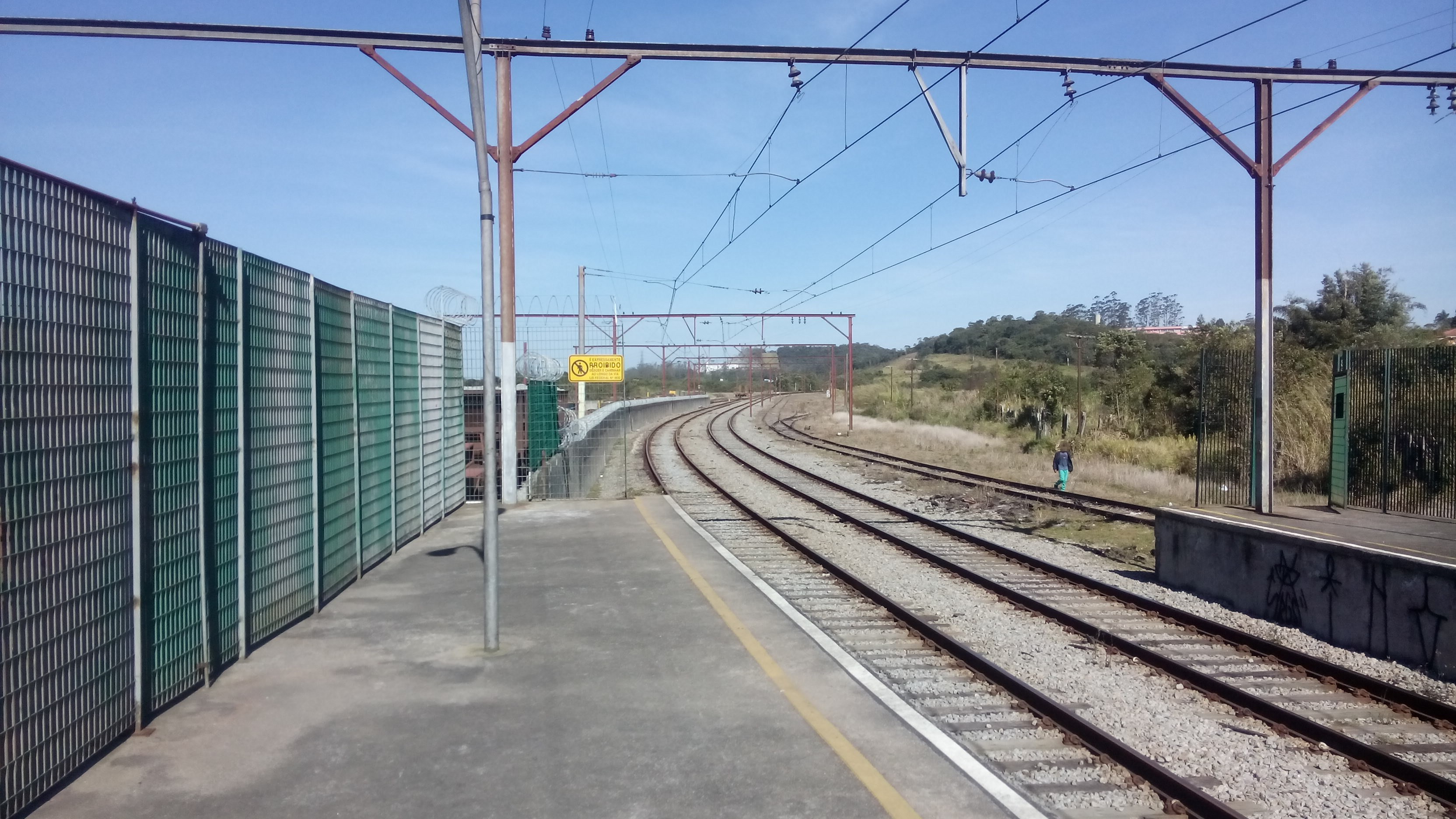 plataforma da estação Rio Grande da Serra. vista ao sul (até Paranapiacaba)